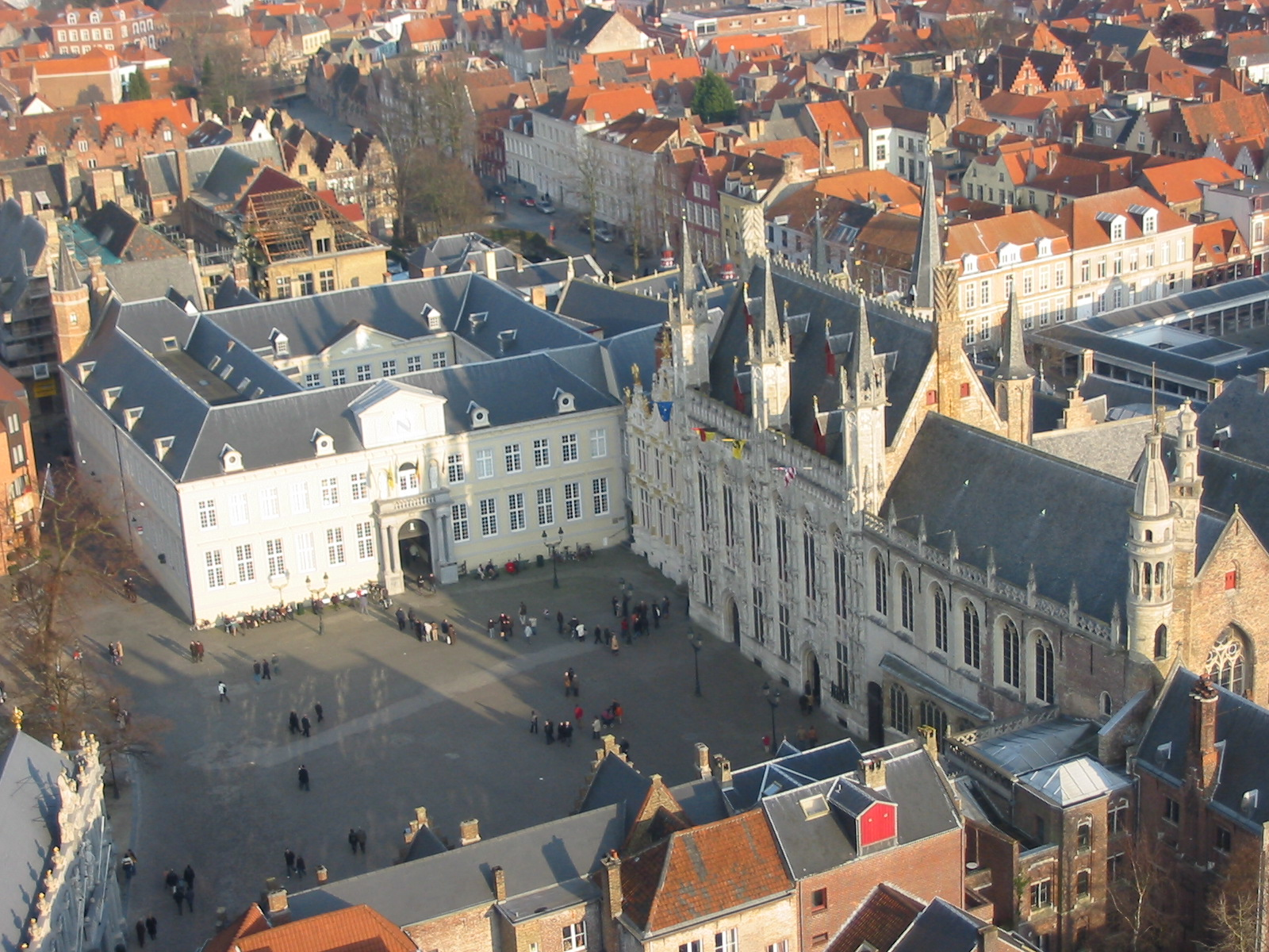 De Burg in Bruges